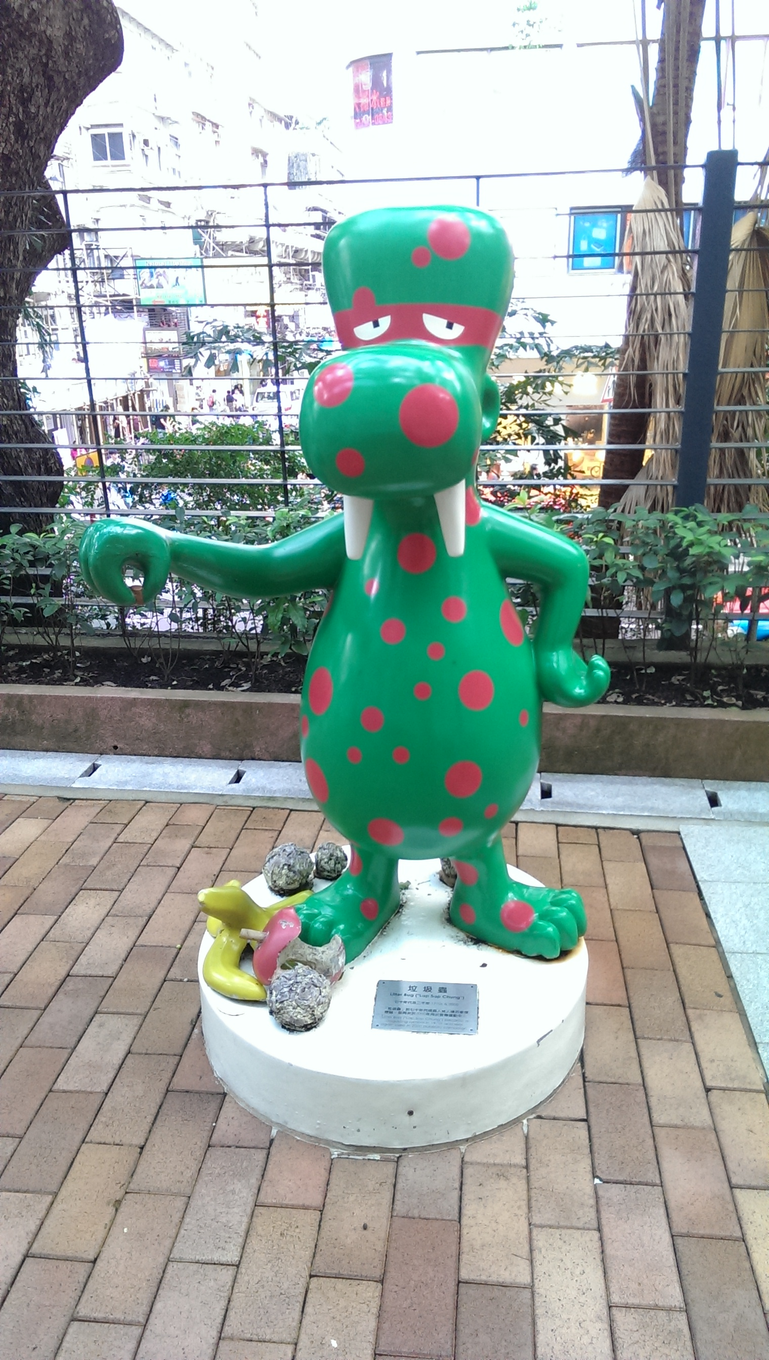 中文（香港）: 垃圾蟲 Litter Bug